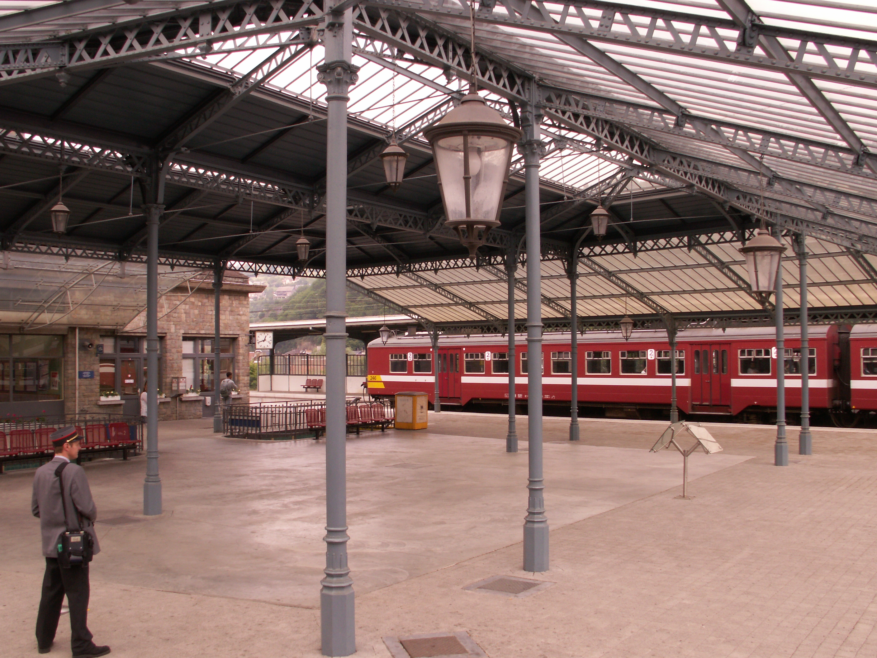 Gare de Pepinster